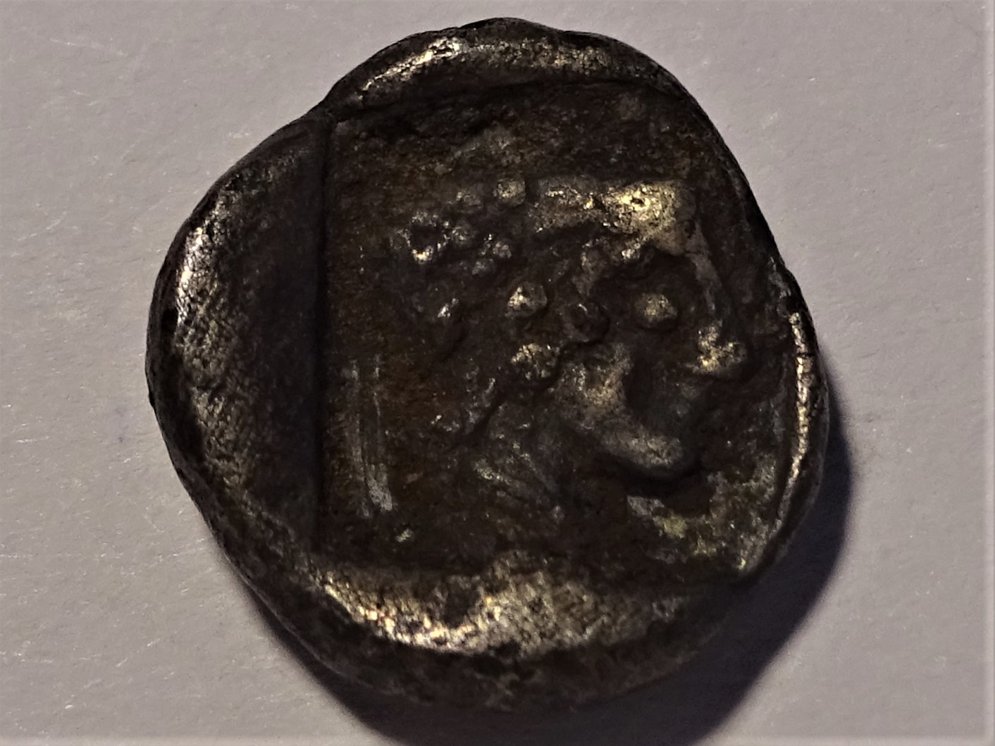 Rückseite des Diobols aus Knidos, archaischer Aphroditekopf